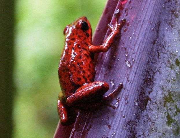 Oophaga pumilio